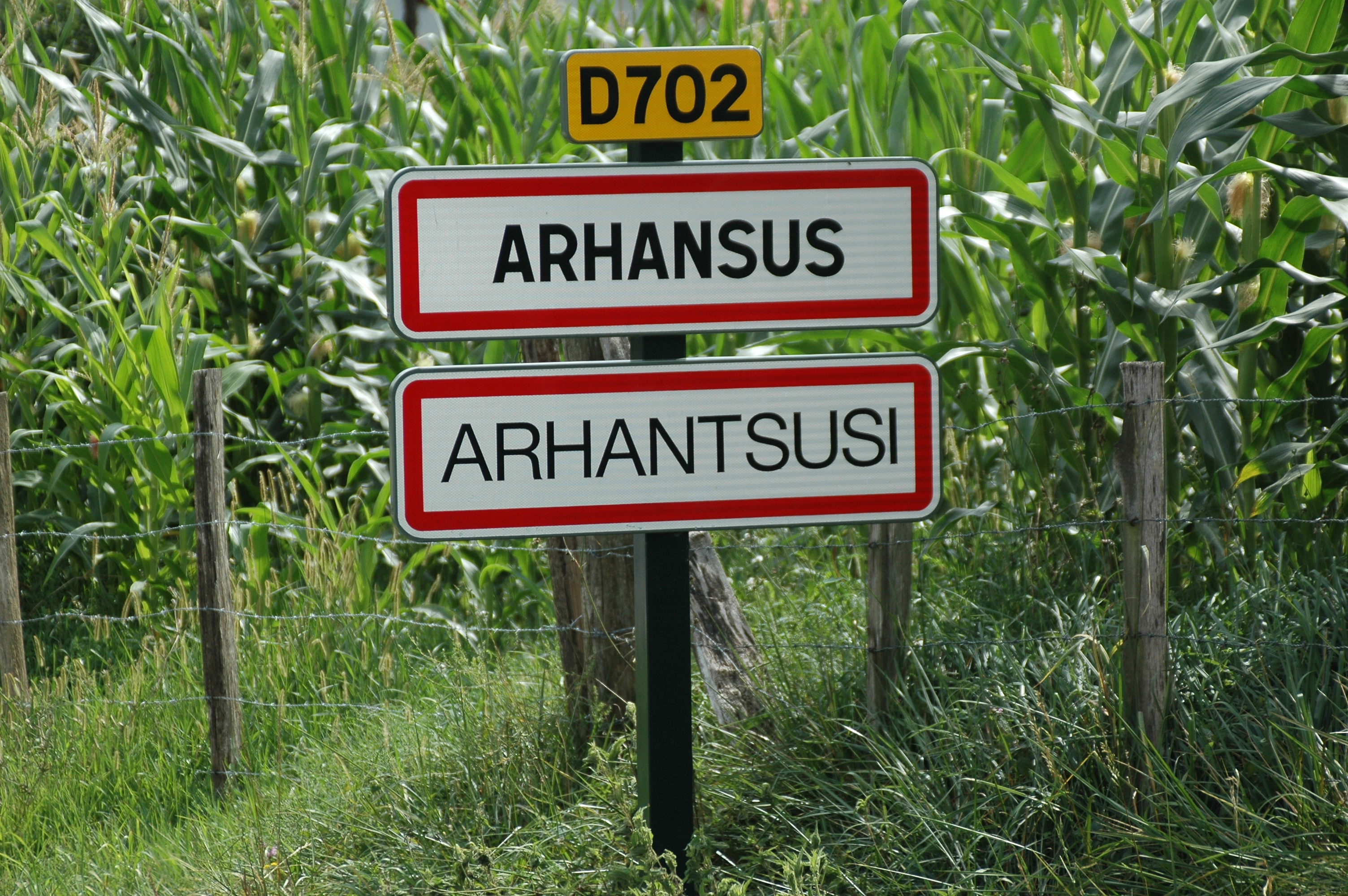 Panneau d'entrée bilingue d'Arhansus sur la D702